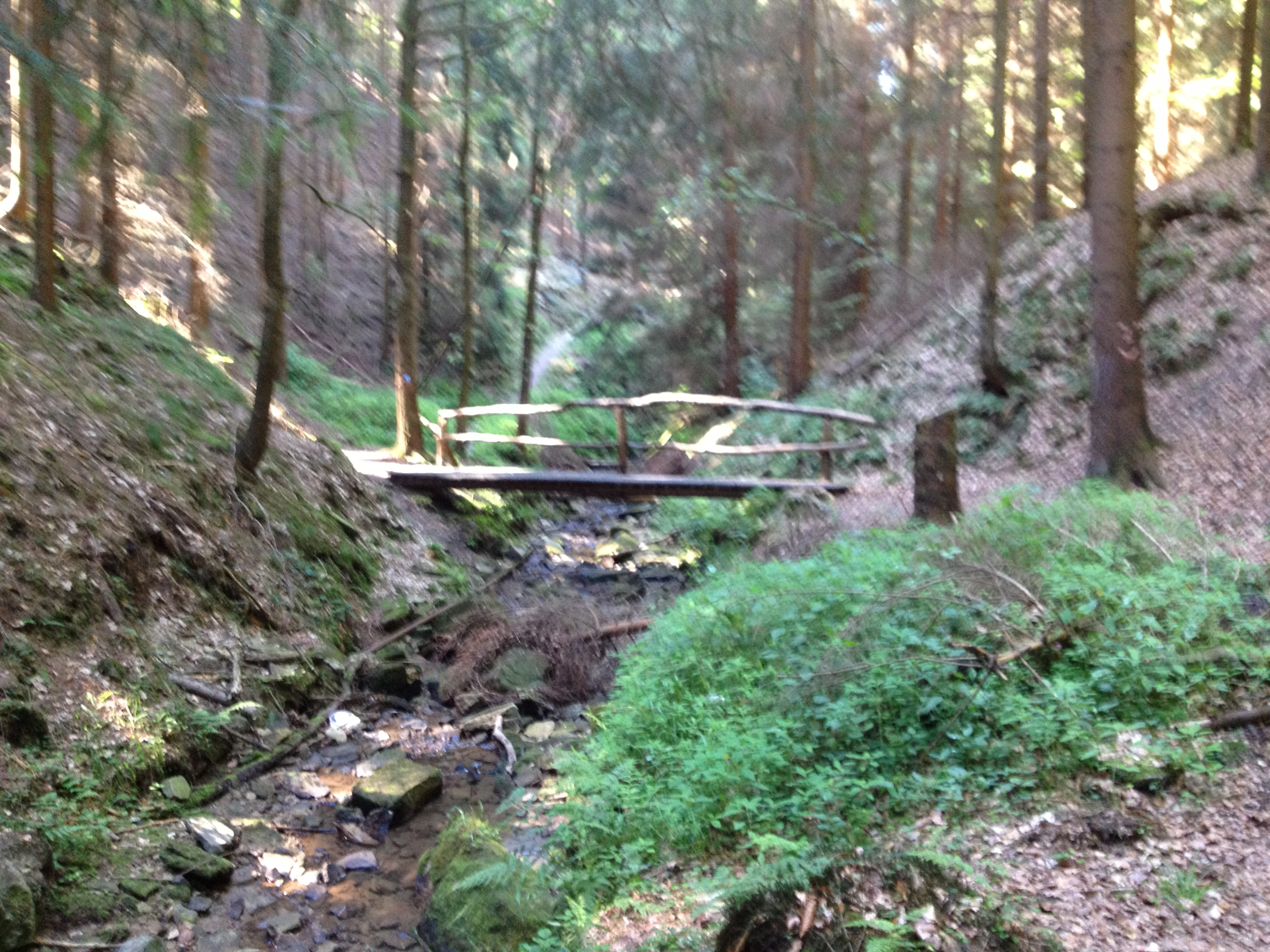 Kassel-Steig nahe Landwehrhagen